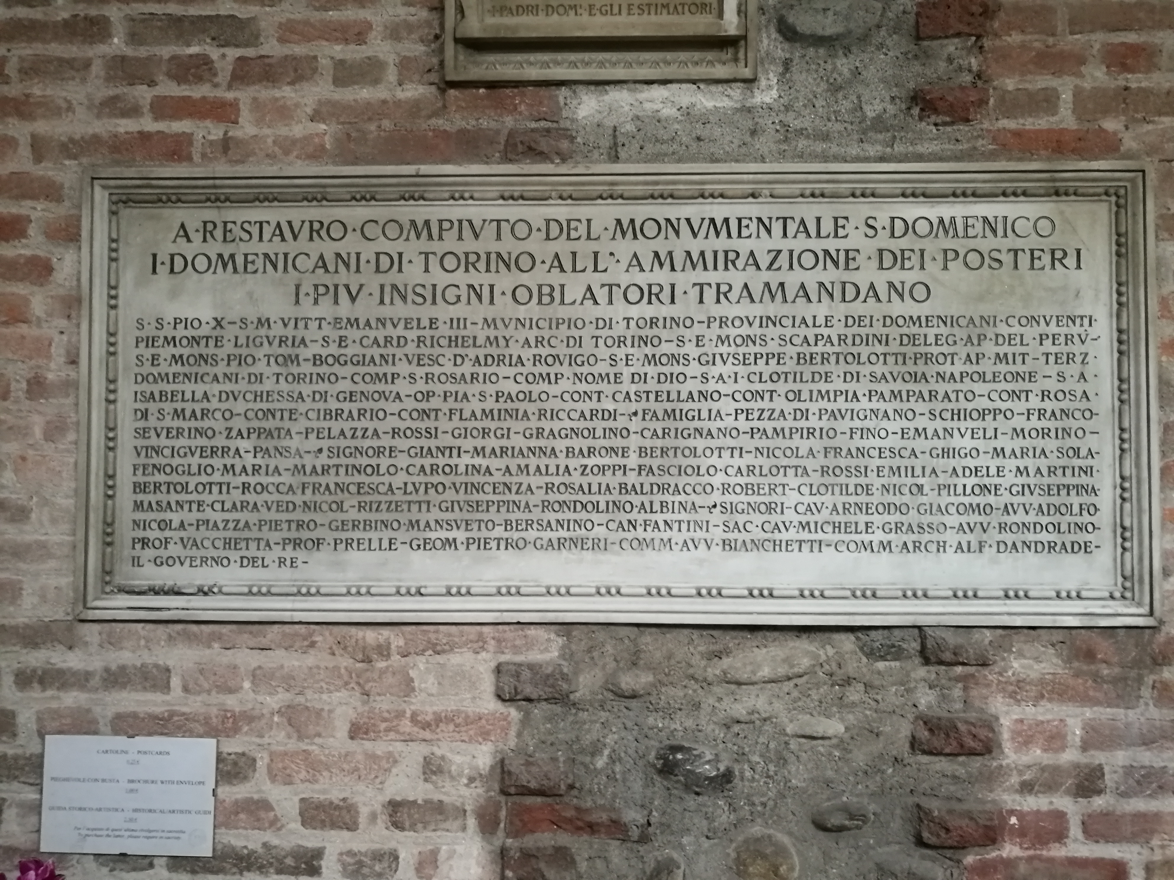 La targa riporta i nomi delle persone e famiglie che hanno contribuito al restauro della chiesa di San Domenico in Torino